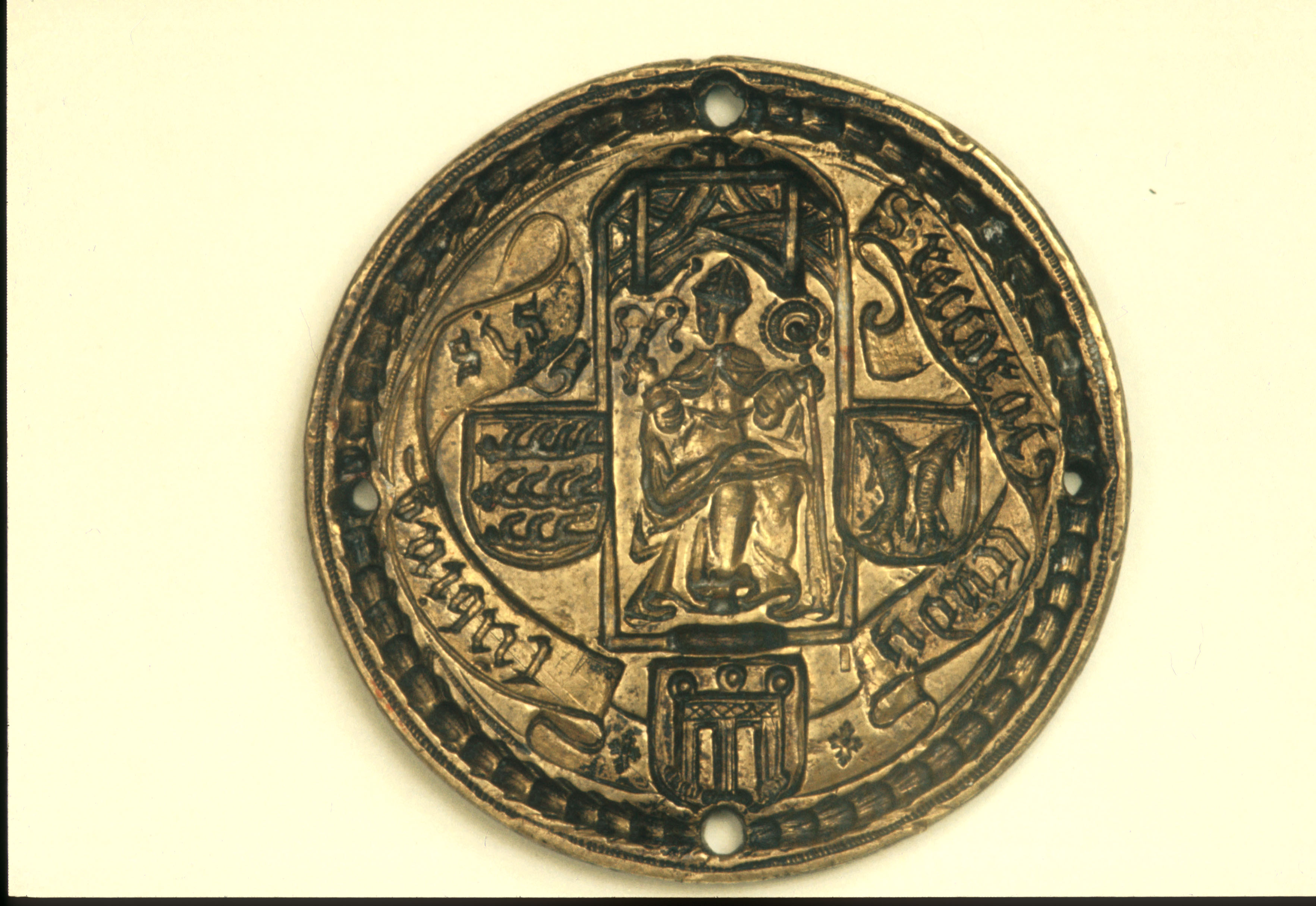 Siegel der Universität Tübingen aus dem Universitätsarchiv